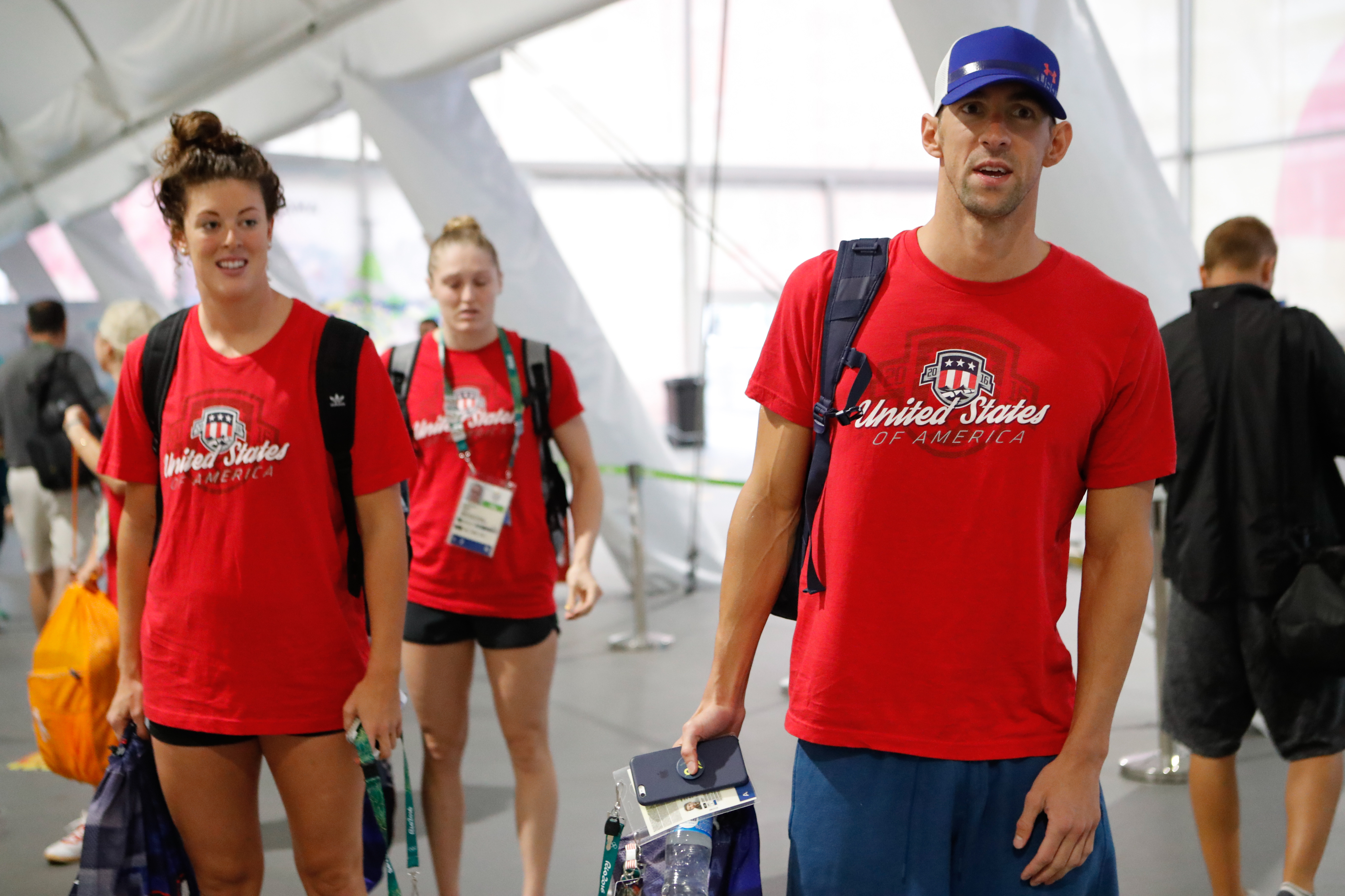 Rio de Janeiro - O nadador Michael Phelps, norte-americano recordista de medalhas olímpicas, no restaurante dos atletas, na Vila Olímpica dos Jogos Rio 2016 (Fernando Frazão/Agência Brasil)